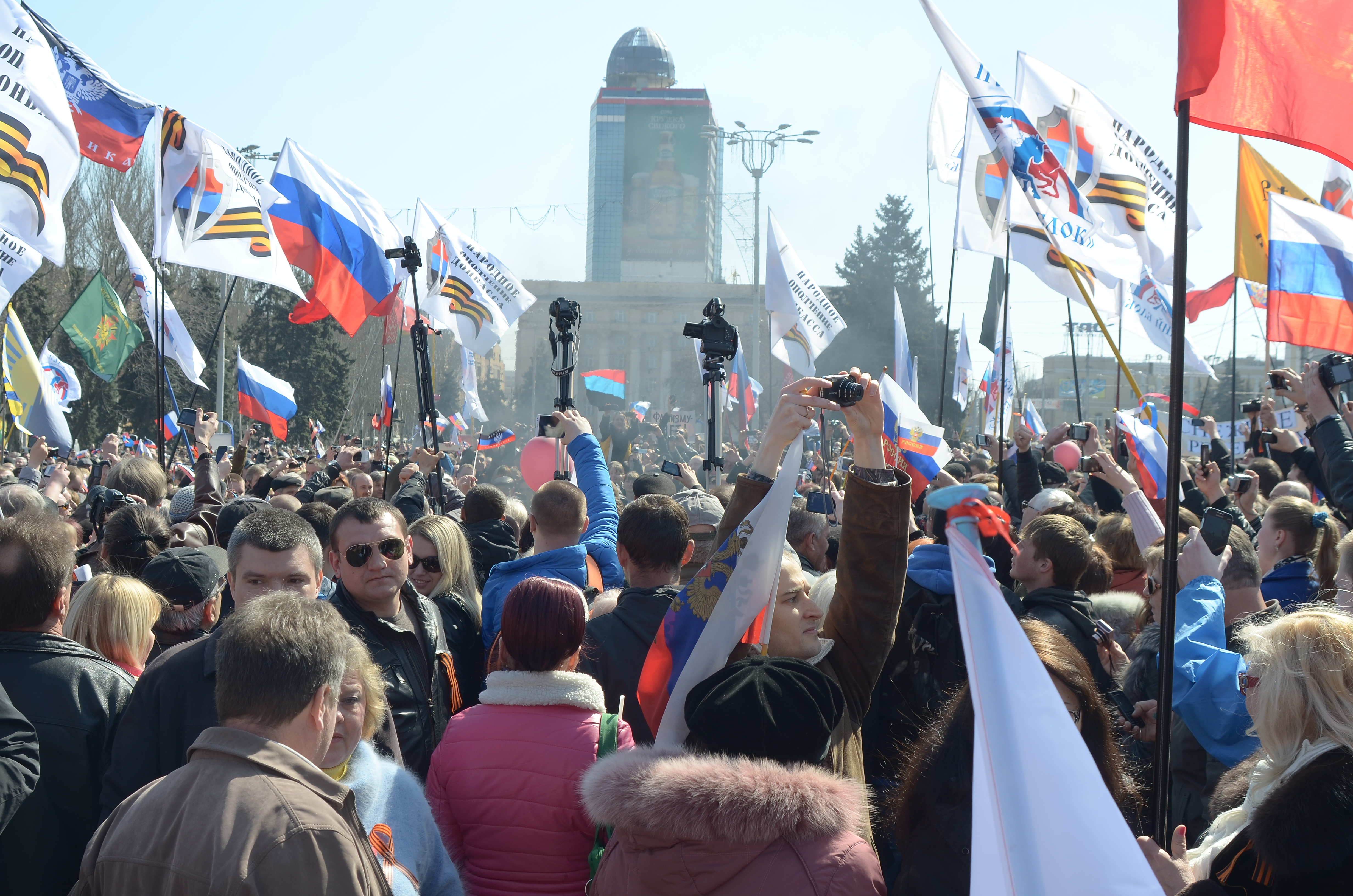 Протесты в Донецке